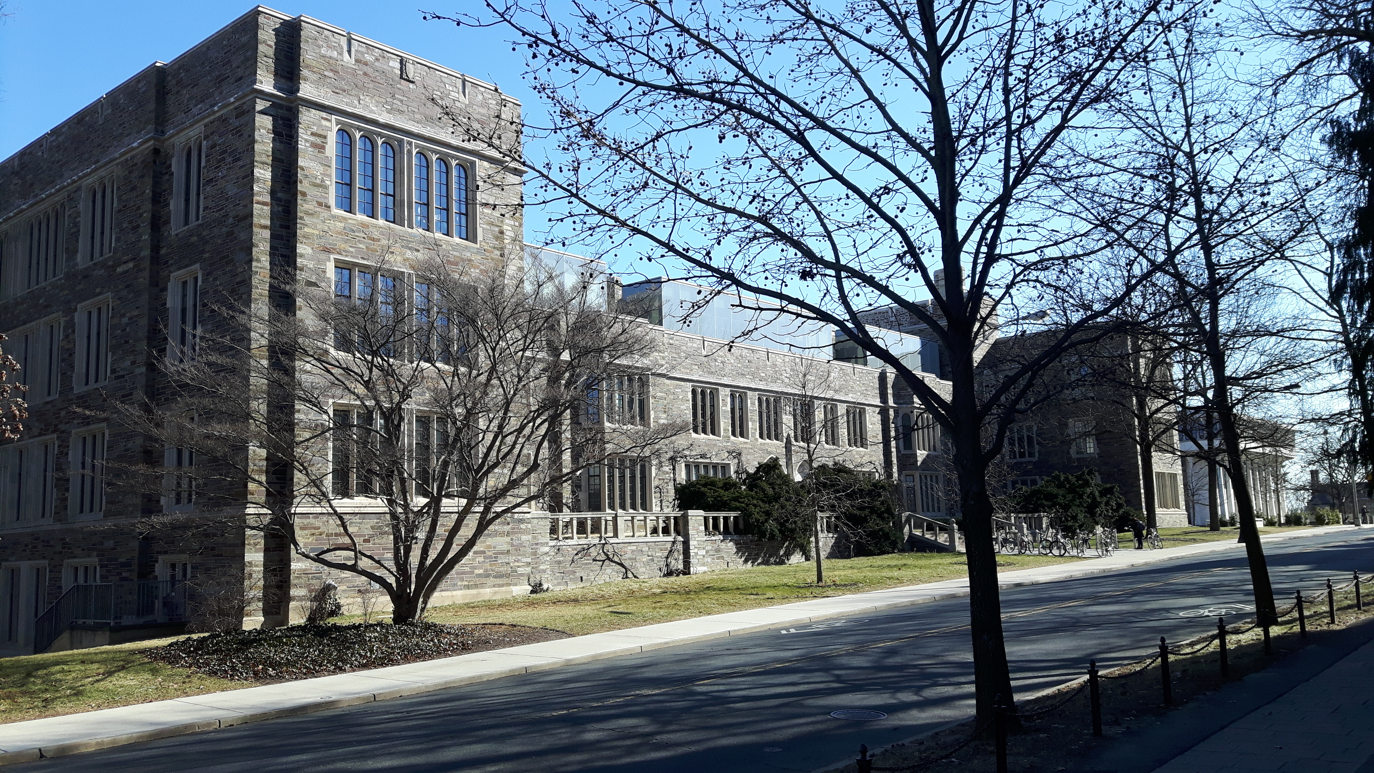 The Julis Romo Rabinowitz Building at Princeton University